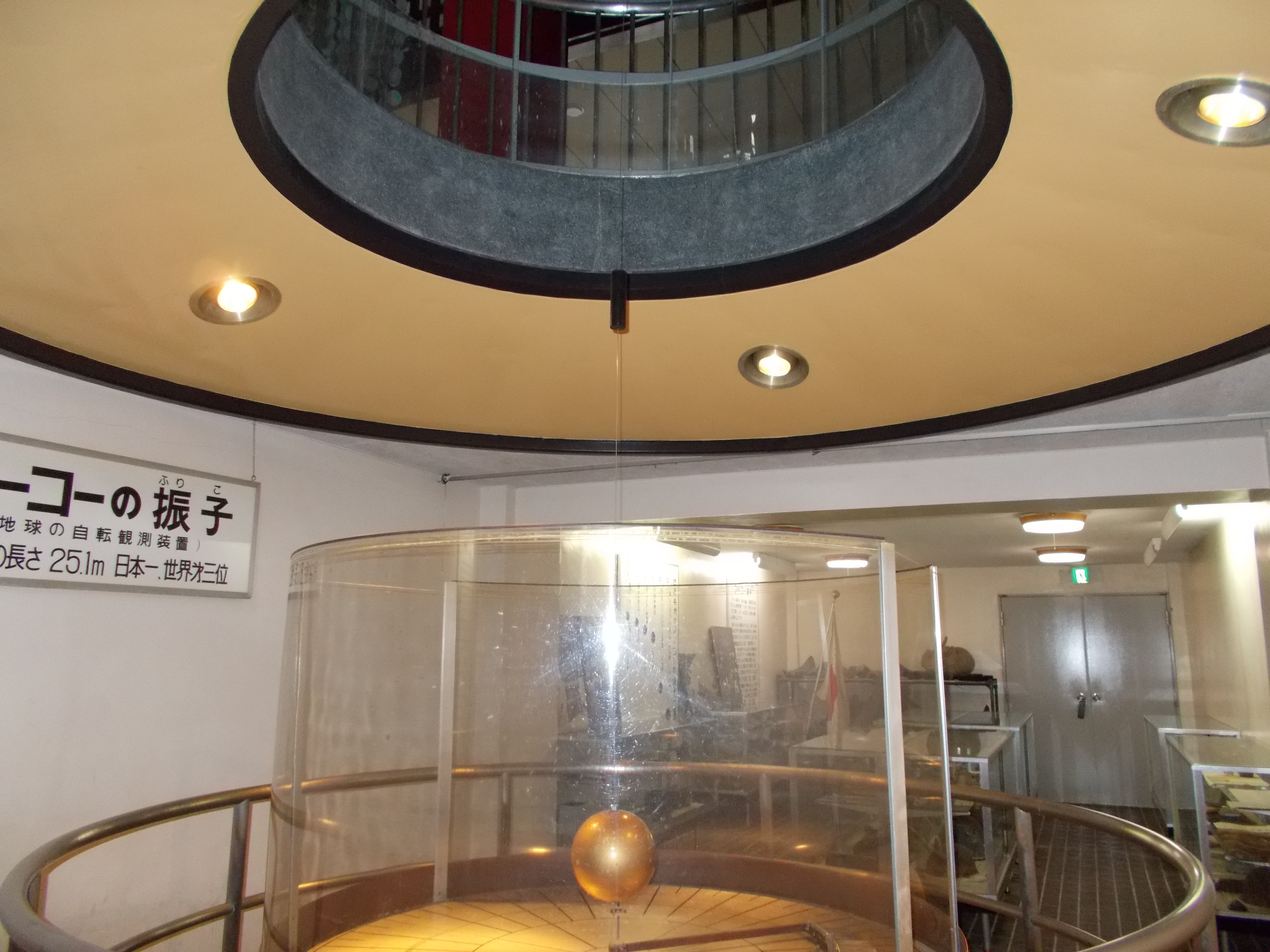 福済寺のフーコーの振り子。2017年1月31日撮影